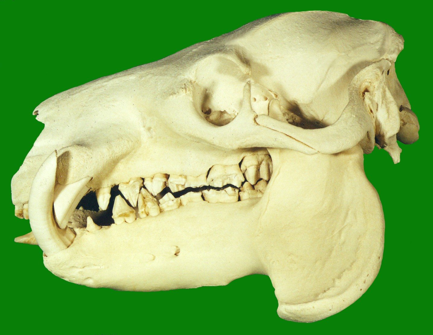 Skull of Pygmy Hippopotamus (Choeropsis liberiensis) de: Schädel eines Zwergflusspferdes